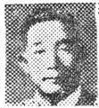 Kim Shin, 1961-may-16